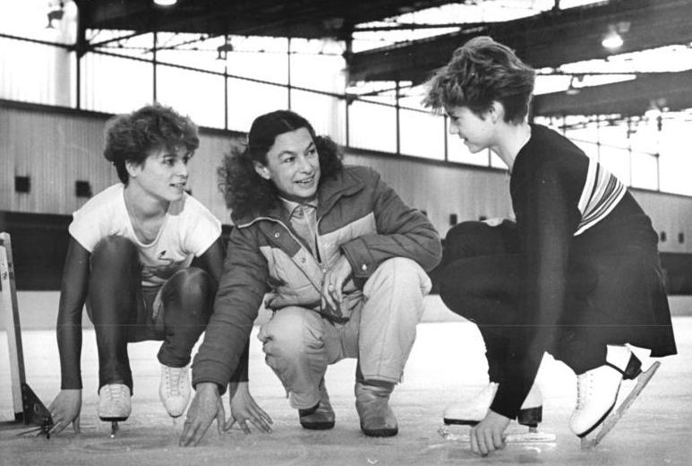 Simone Lang, Jutta Müller, Evelyn Großmann ADN-ZB Thieme 9.12.1988 Karl-Marx-Stadt: Eiskunstlauf-Jubiläum.- Die erfolgreichste Eiskunstlauf-Trainerin der Welt, Jutta Müller (SC Karl-Marx-Stadt), begeht am 13. Dezember 1988 ihren 60. Geburtstag. Mit ihren neuen jungen talentierten Schützlingen, Simone Lang (links) und Evelyn Großmann (rechts) freut sie sich über eine gelungene Pflichtfigur während des Trainings. Siehe auch Motiv 20 N und ADN-Meldung vom 9.12.1988.